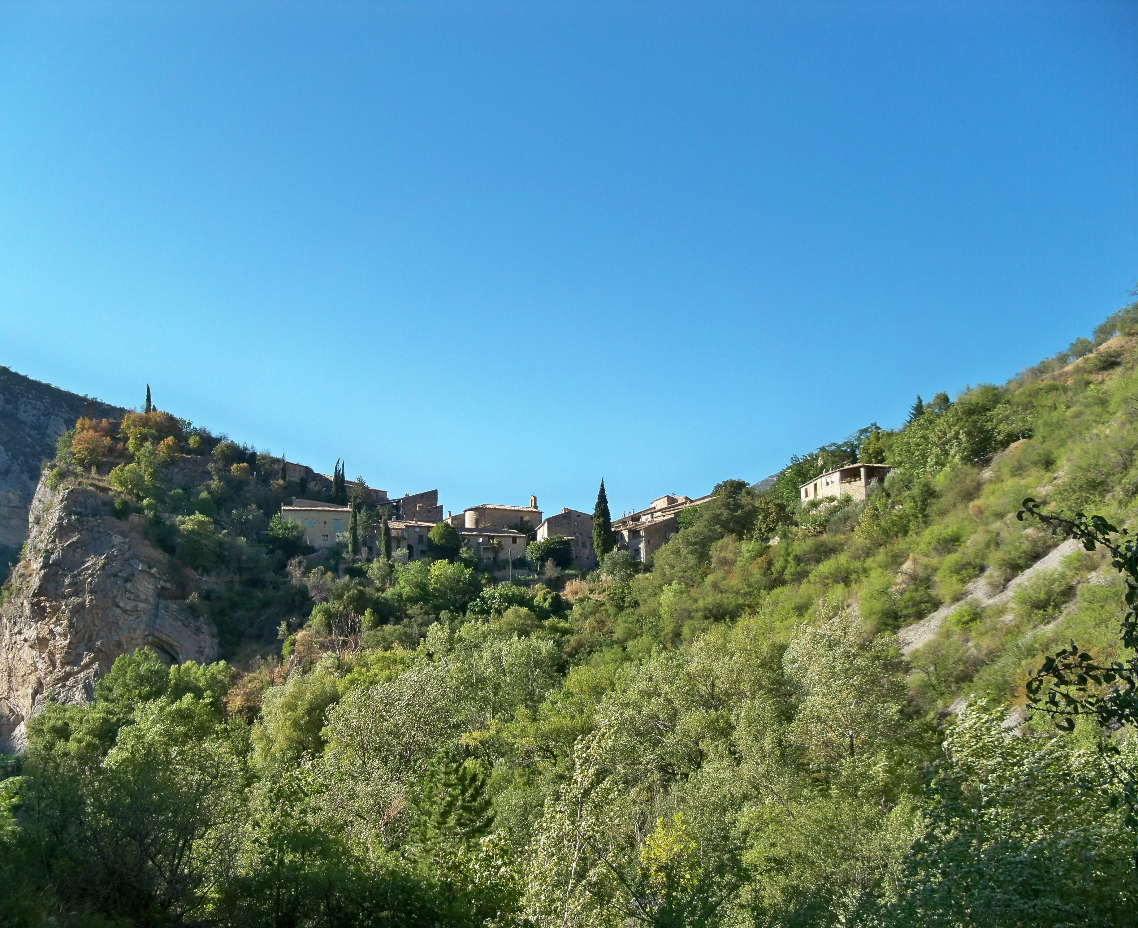 Village de Saint May (26)